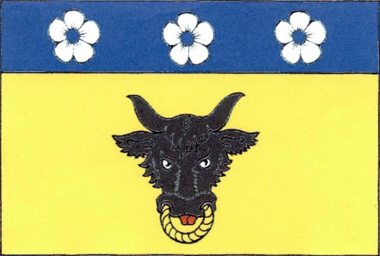 vlajka, Žďánice , okres Žďár nad Sázavou